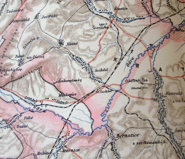 Mapka Suchdolu nad Odrou z roku 1898